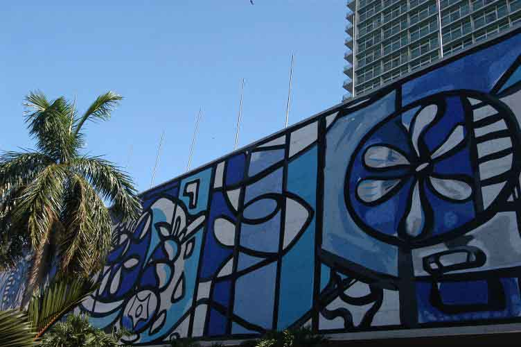 Cuba, september 2005, info in de Metadata